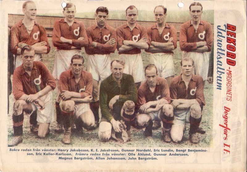 Degerfors IF, 1943.